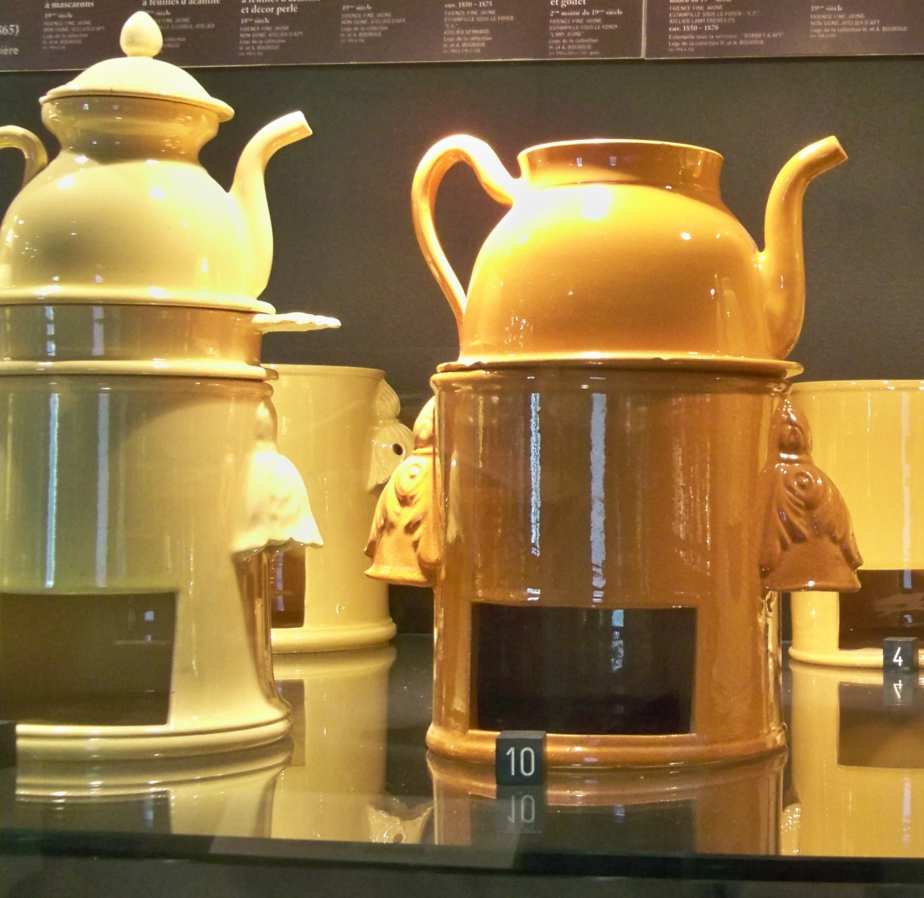 faience d'Apt (84)